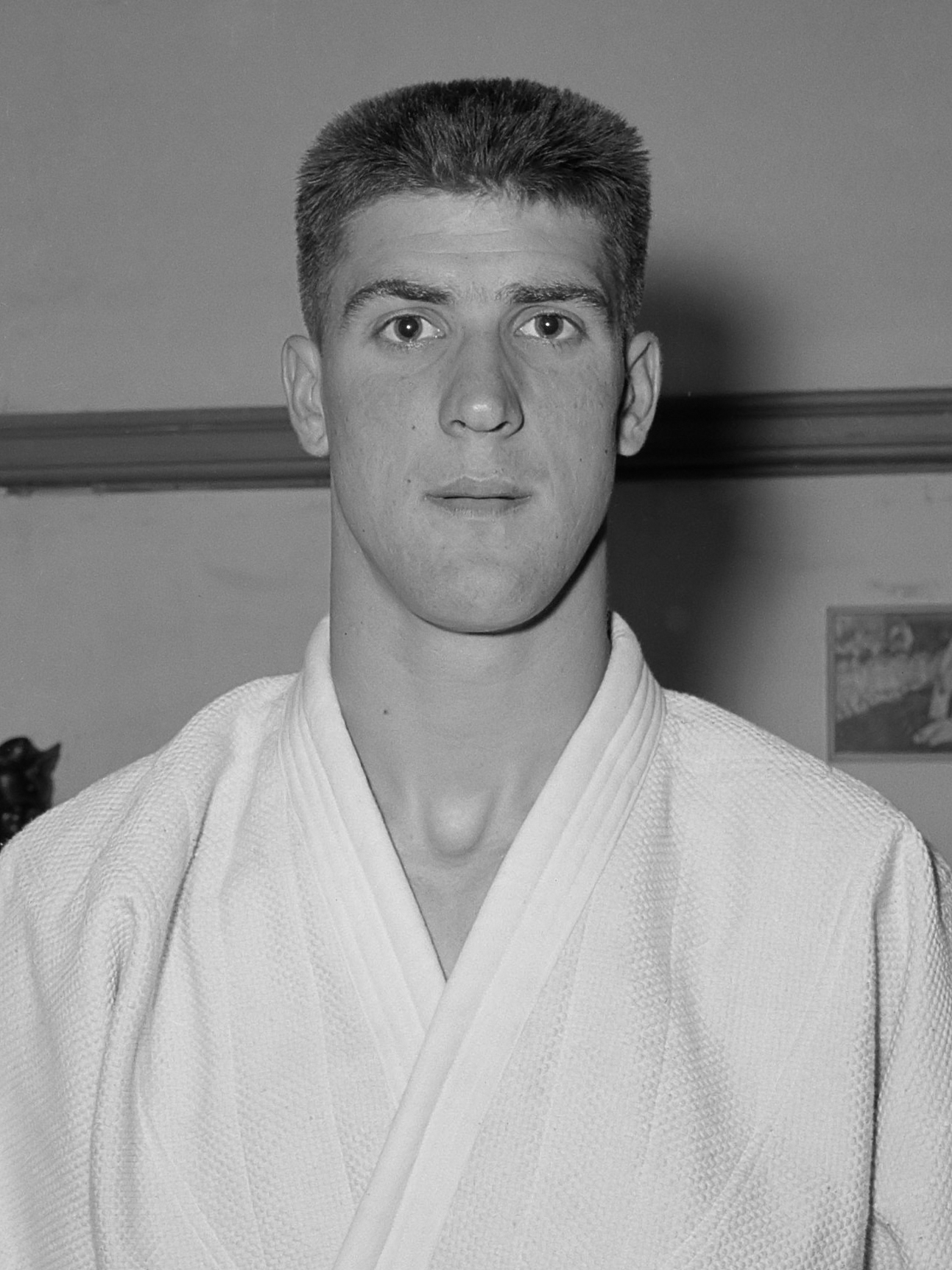 Portret van Anton Geesink 6 juni 1956